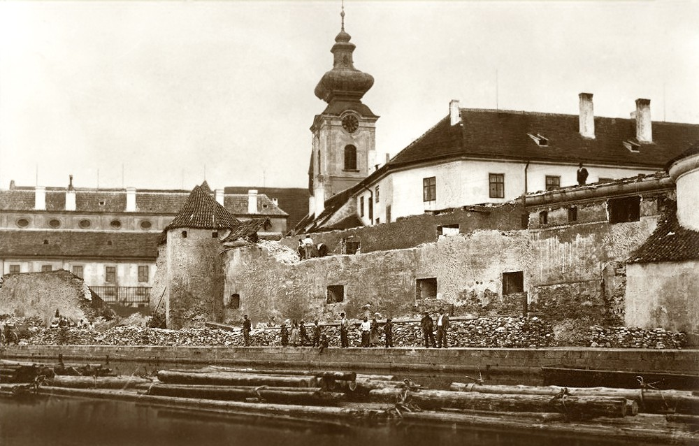 bourání hradeb a Klínovité bašty v roce 1902, v pozadí klášter a Bílá věž, České Budějovice